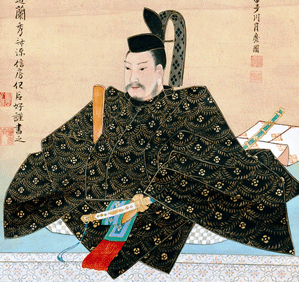 南部信房の肖像。